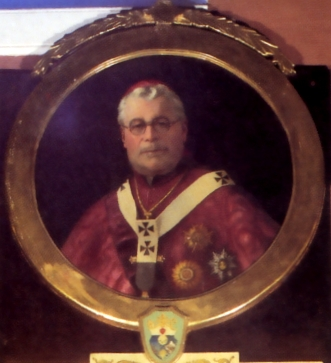 Pedro Pascual Farfán de los Godos (1870 - 1945) Arzobispo de Lima, Perú.